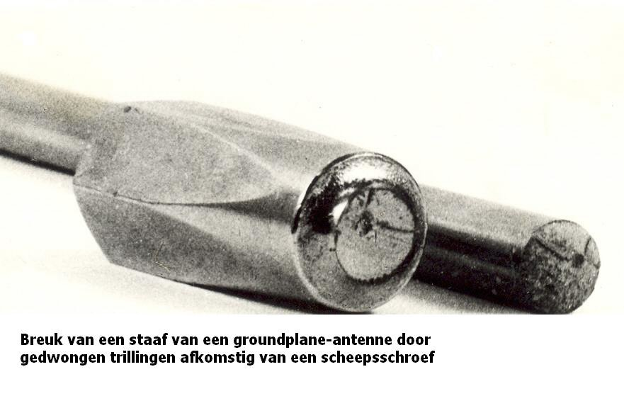 afbeelding van breukvla